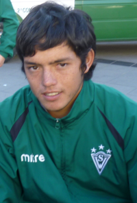 Fotografía de Franz Schulz, jugador de Santiago Wanderers de Valparaíso, club de la primera división de Chile.